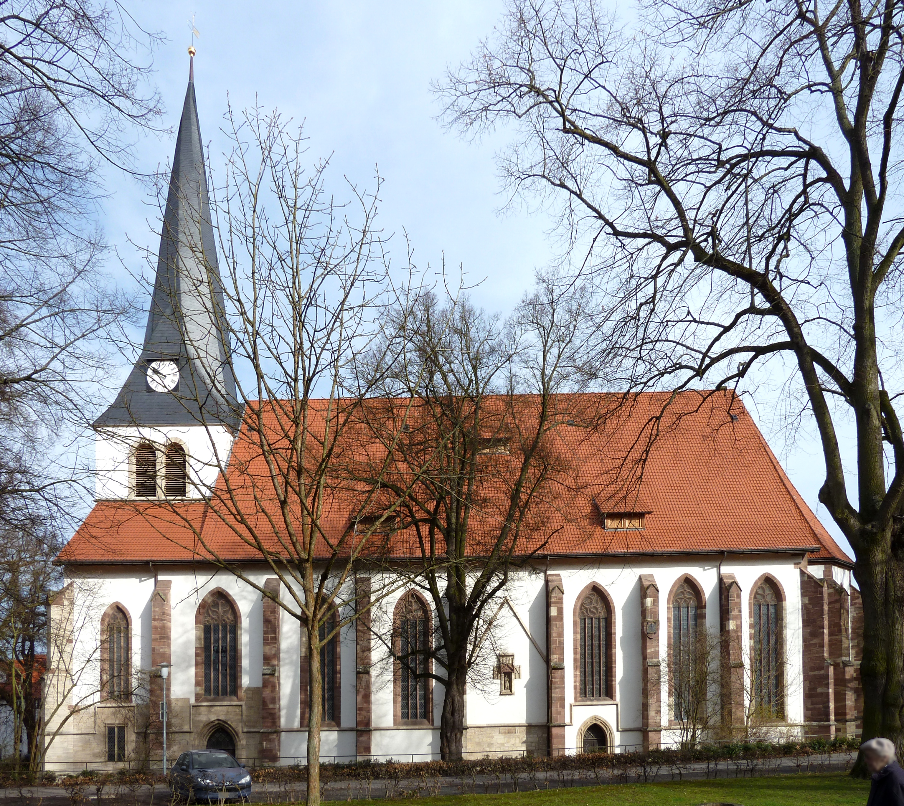 Ev.-luth. Kirche St. Sixti in Northeim, Niedersachsen. Südansicht